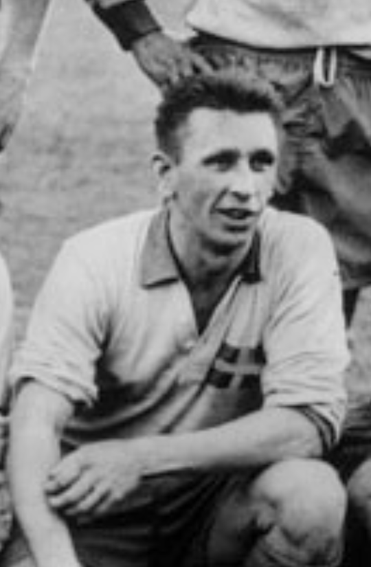 Reino Börjesson con Suecia en 1958